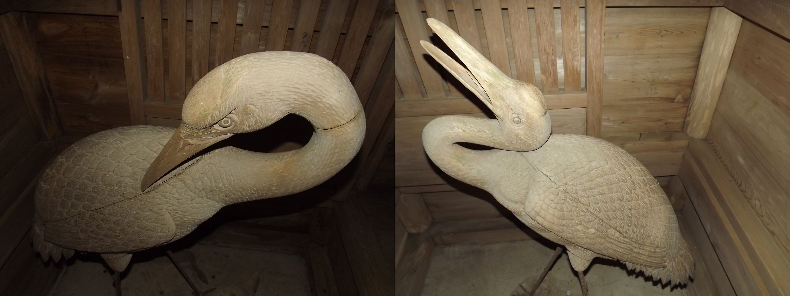 鶴林寺の山門の中の２羽の鶴